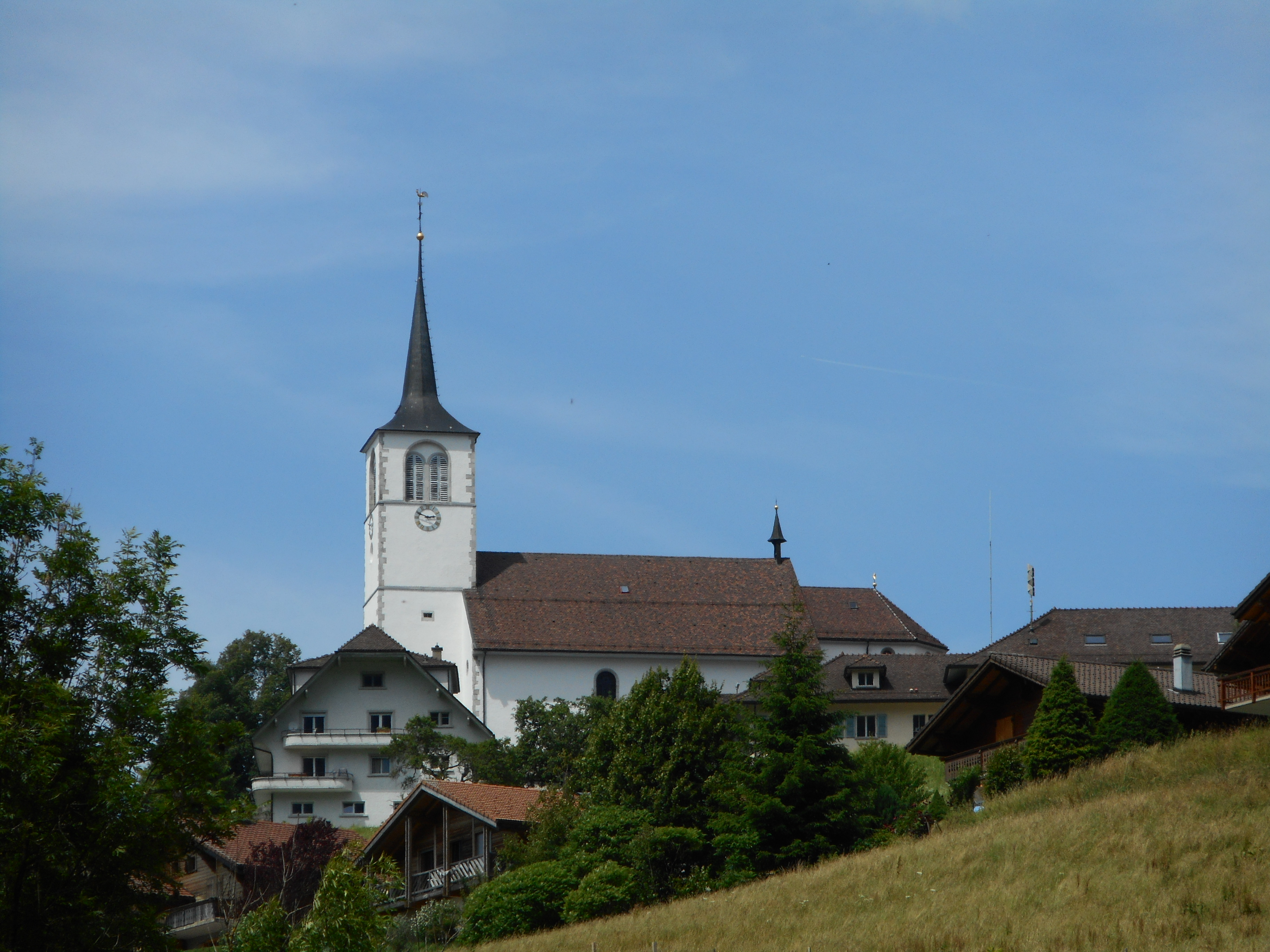 Vue sur l'église de Charmey